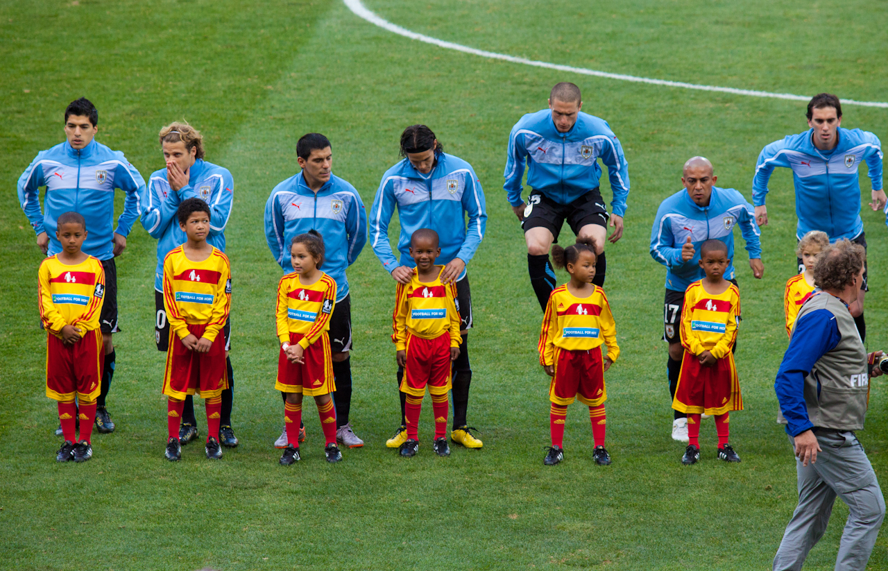 Luis Suárez & Diego Forlan